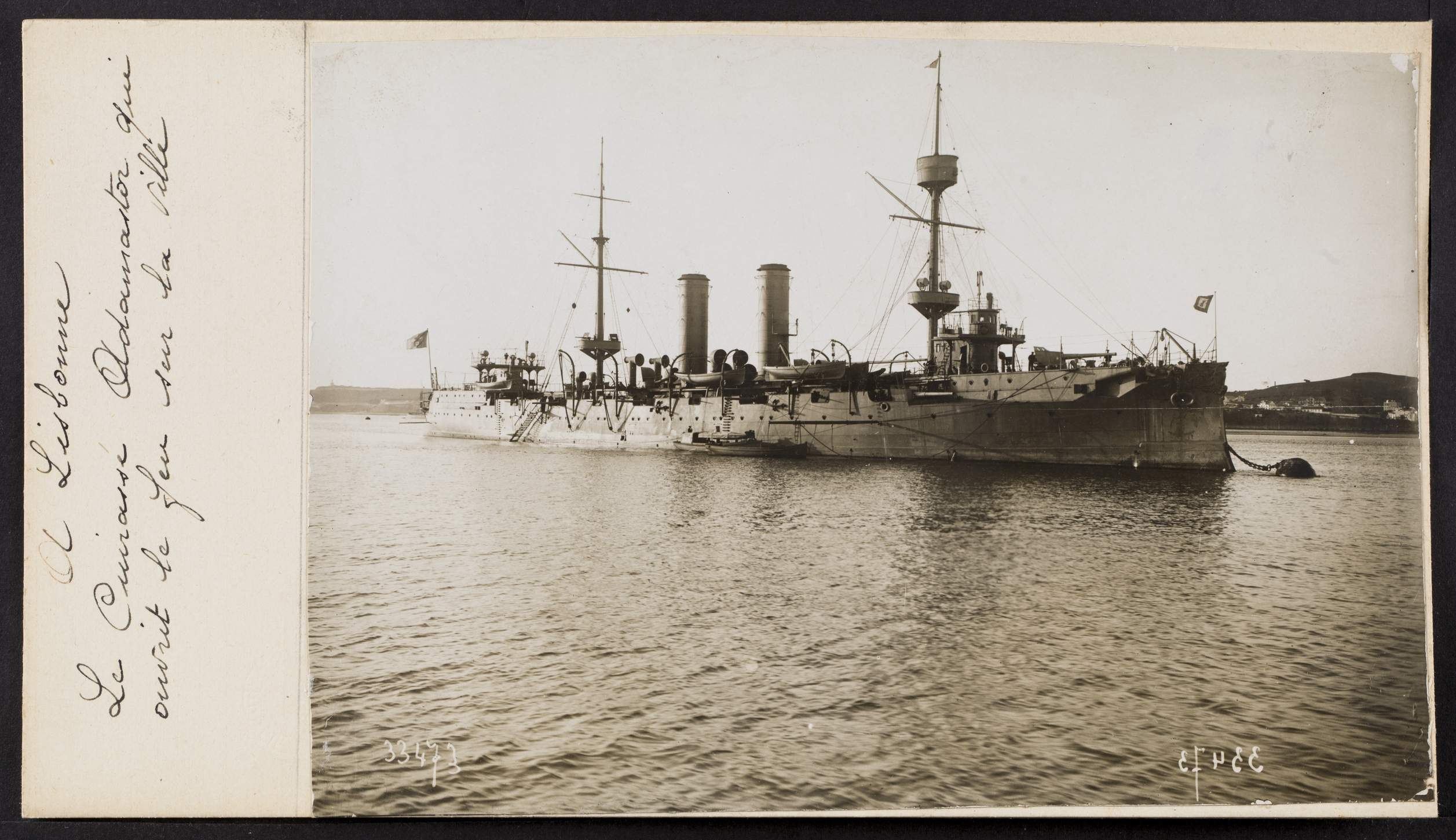 A Lisbonne. Le cuirassé Adamastor qui ouvrit le feu sur la ville.